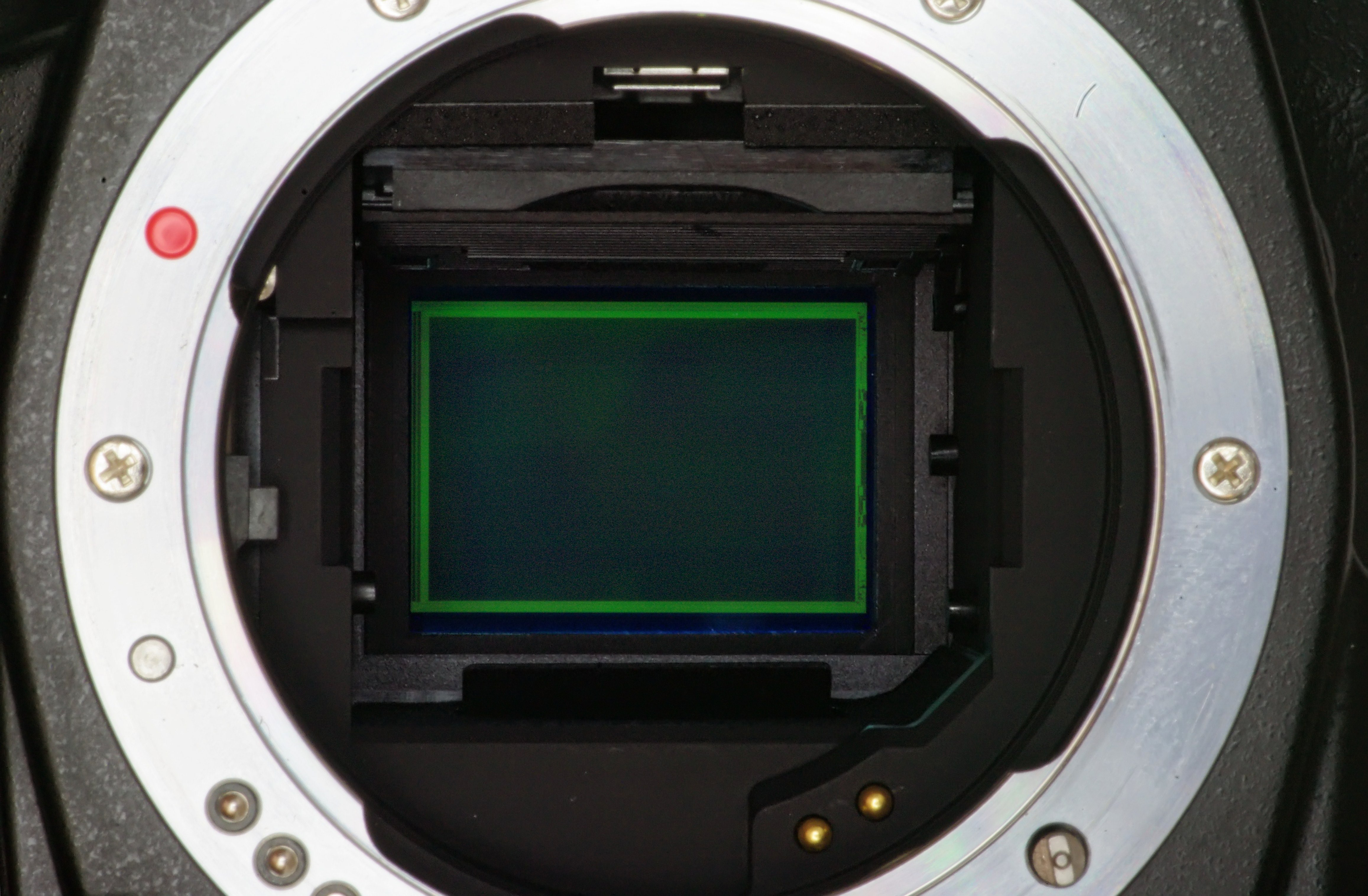 Pentax K-5 Blick auf den Sensor